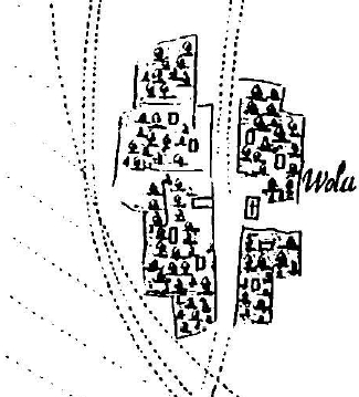 Wieś Wola, obecnie Warszawa, 1705